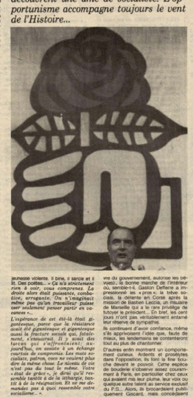 Illustration de l'article de 1981 de Pierre Veilletet dans Sud-Ouest où il emploie l'expression de "Fracture sociale"